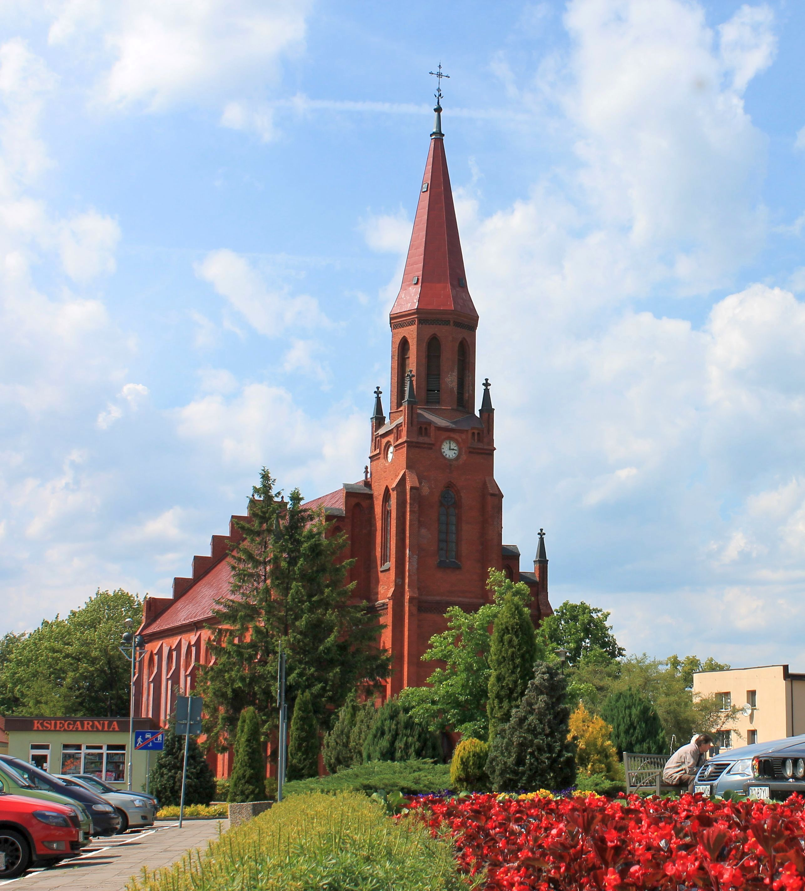 Kościół par. p.w. Wniebowzięcia NMP, 1882-1886, Bobolice, powiat koszaliński